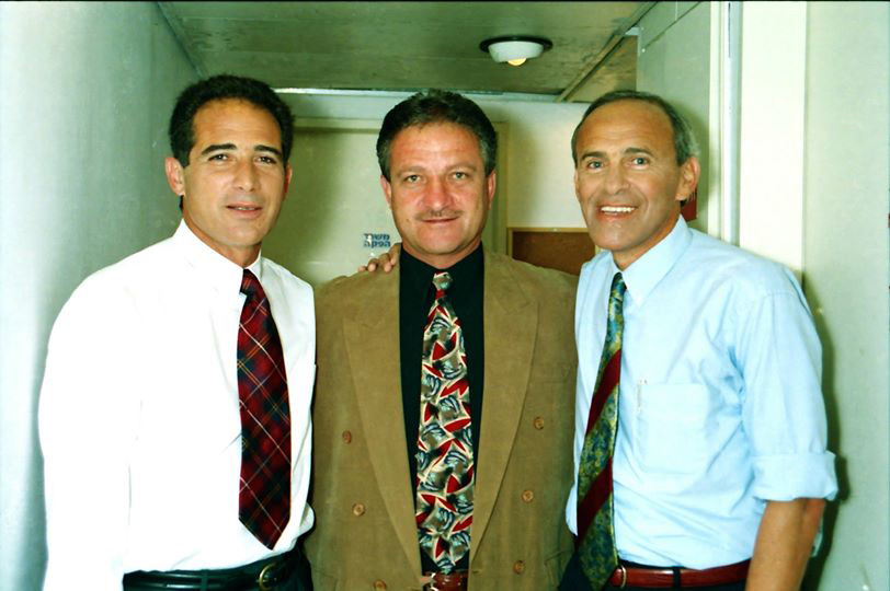 שייע פייגנבוים בחברת גיורא שפיגל ומרדכי שפיגלר